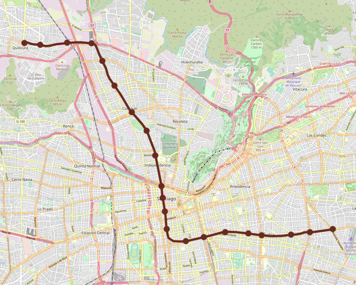 Mapa con el recorrido de la Línea 3 del Metro de Santiago